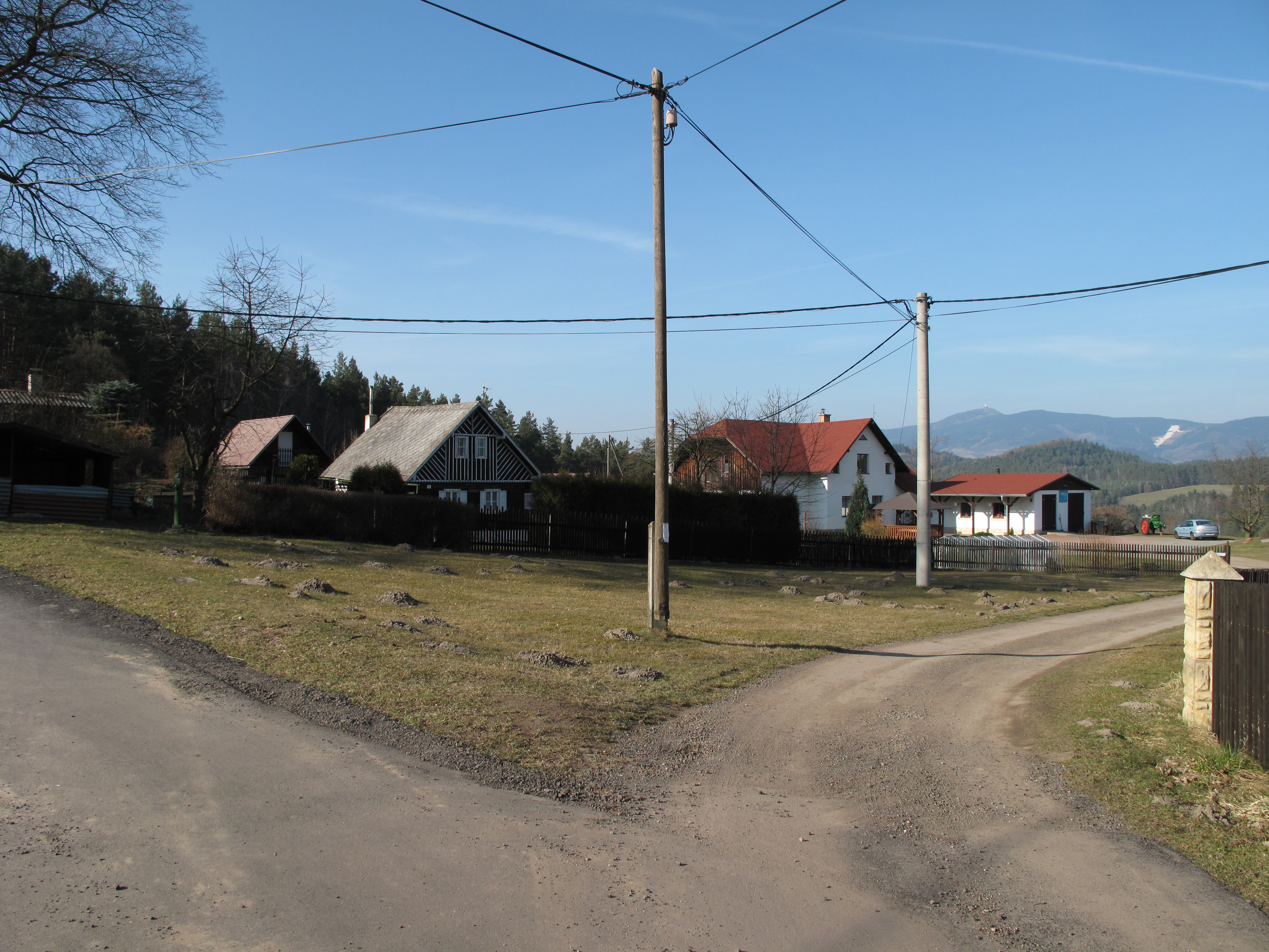 Rozcestí v Roveni. Okres Liberec, Česká republika.